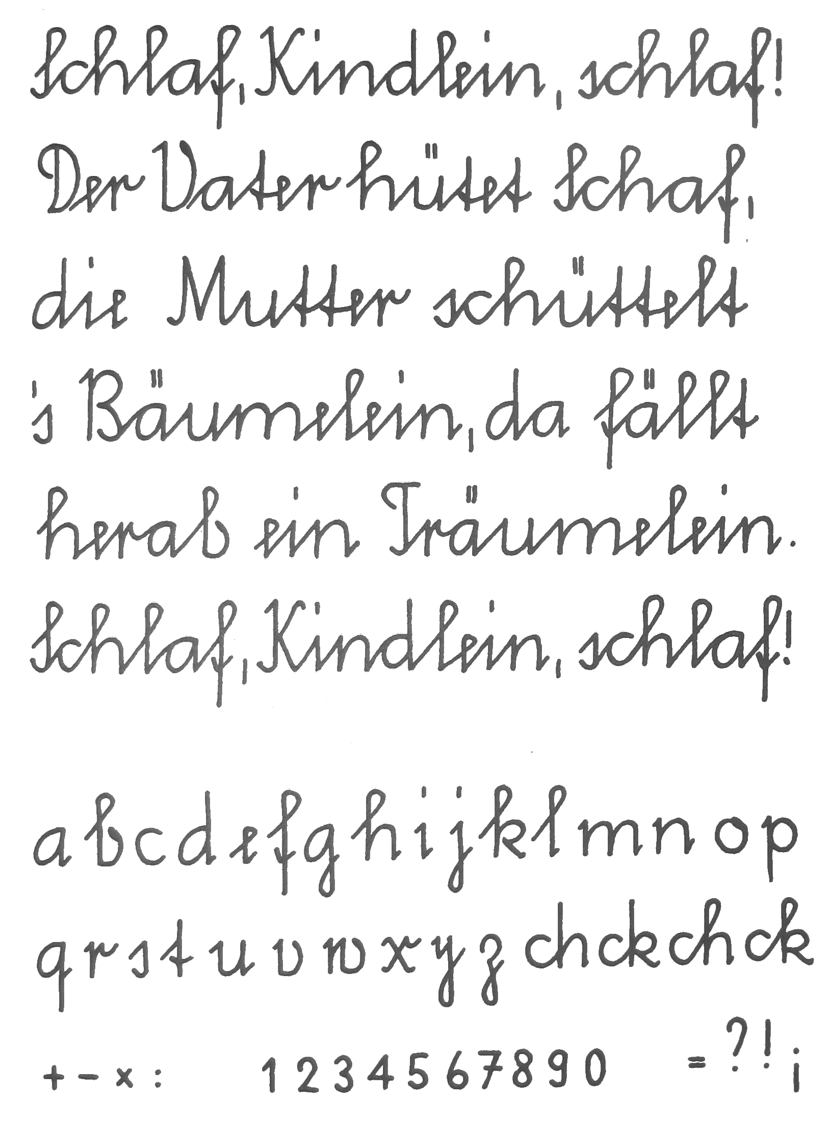 1947 eingeführte Schweizer Schulschrift für 1. und 2. Schuljahr